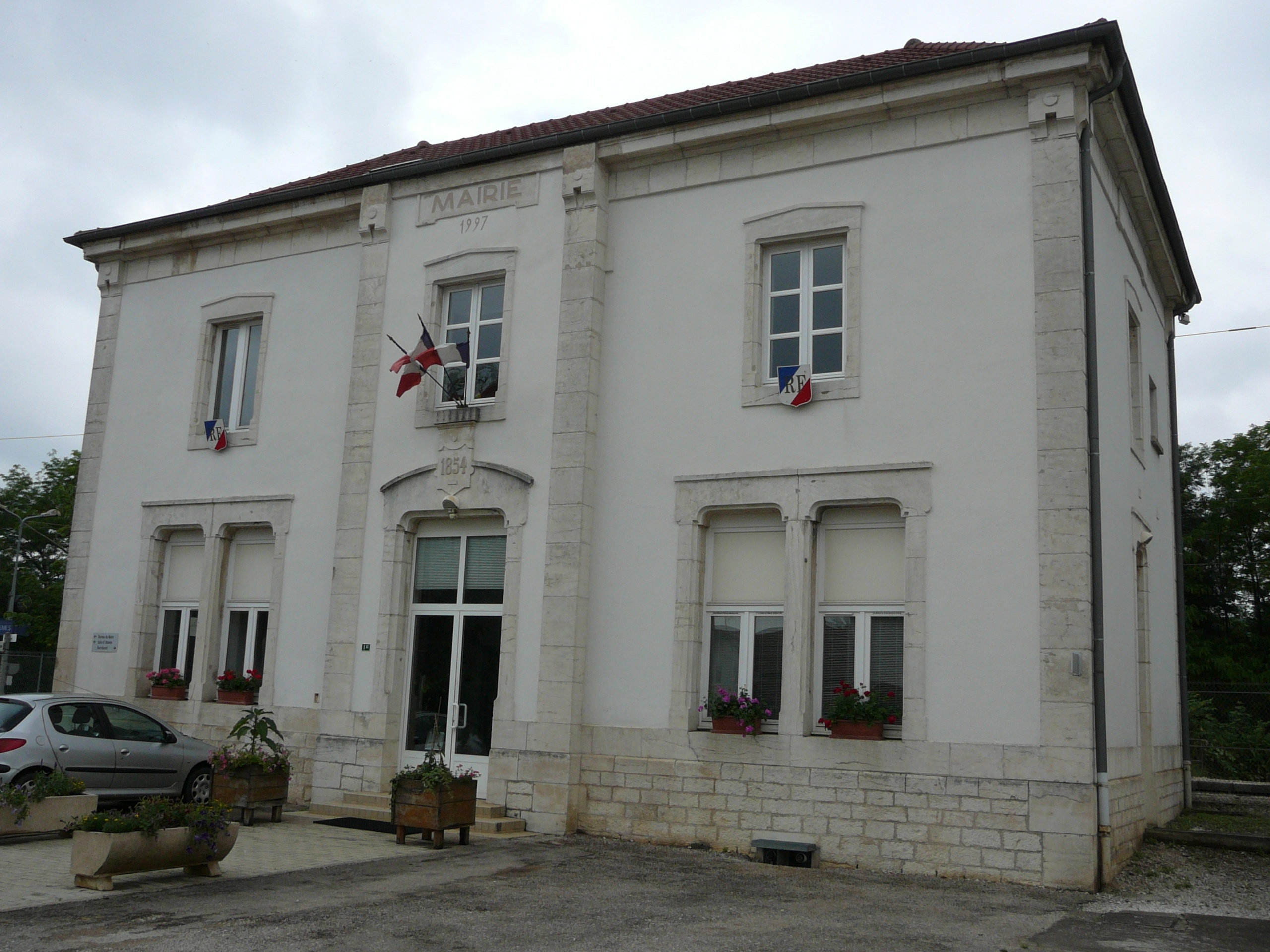 Gare de Dannemarie-Velesmes, vue côté cour